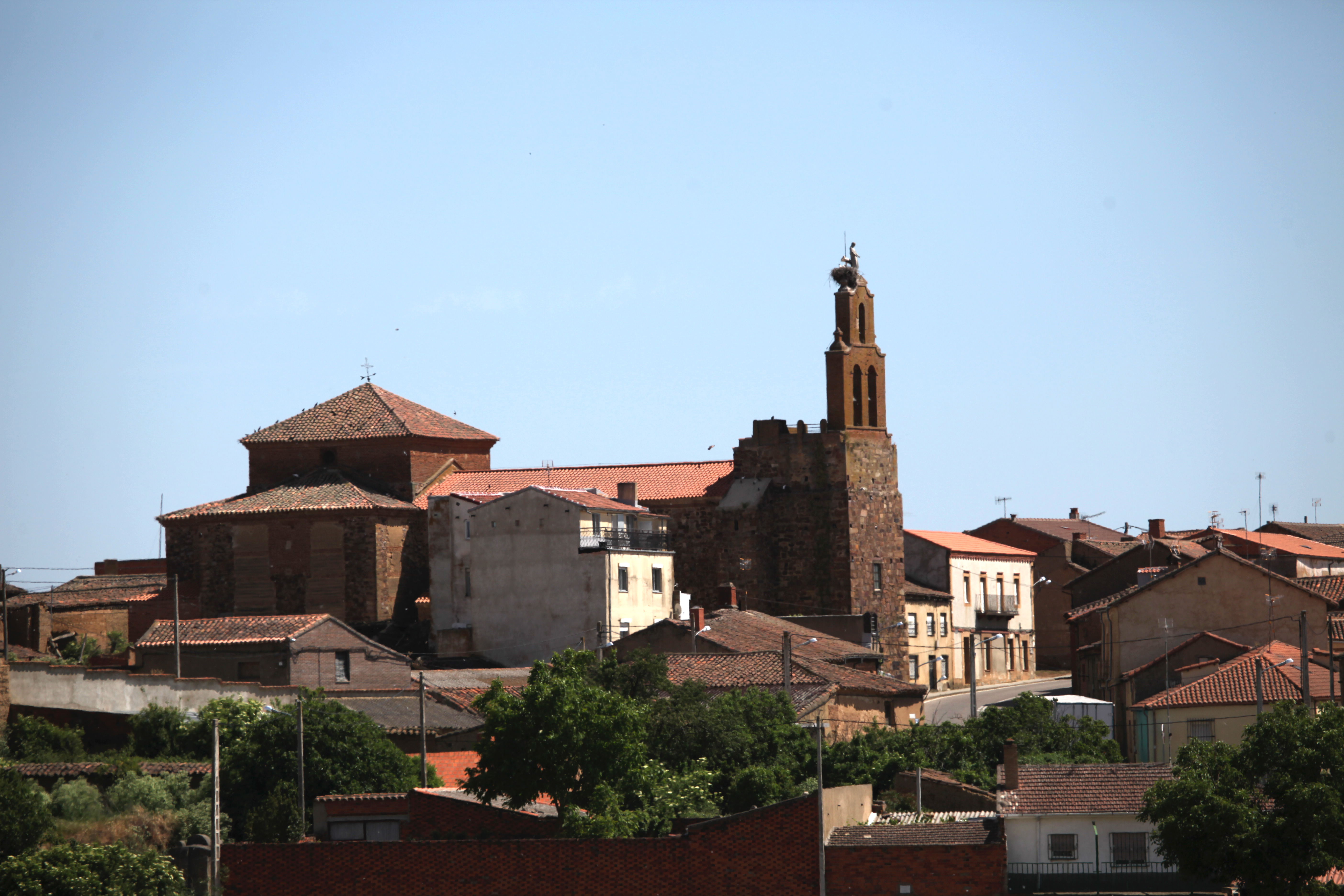 Iglesia de Santovenia